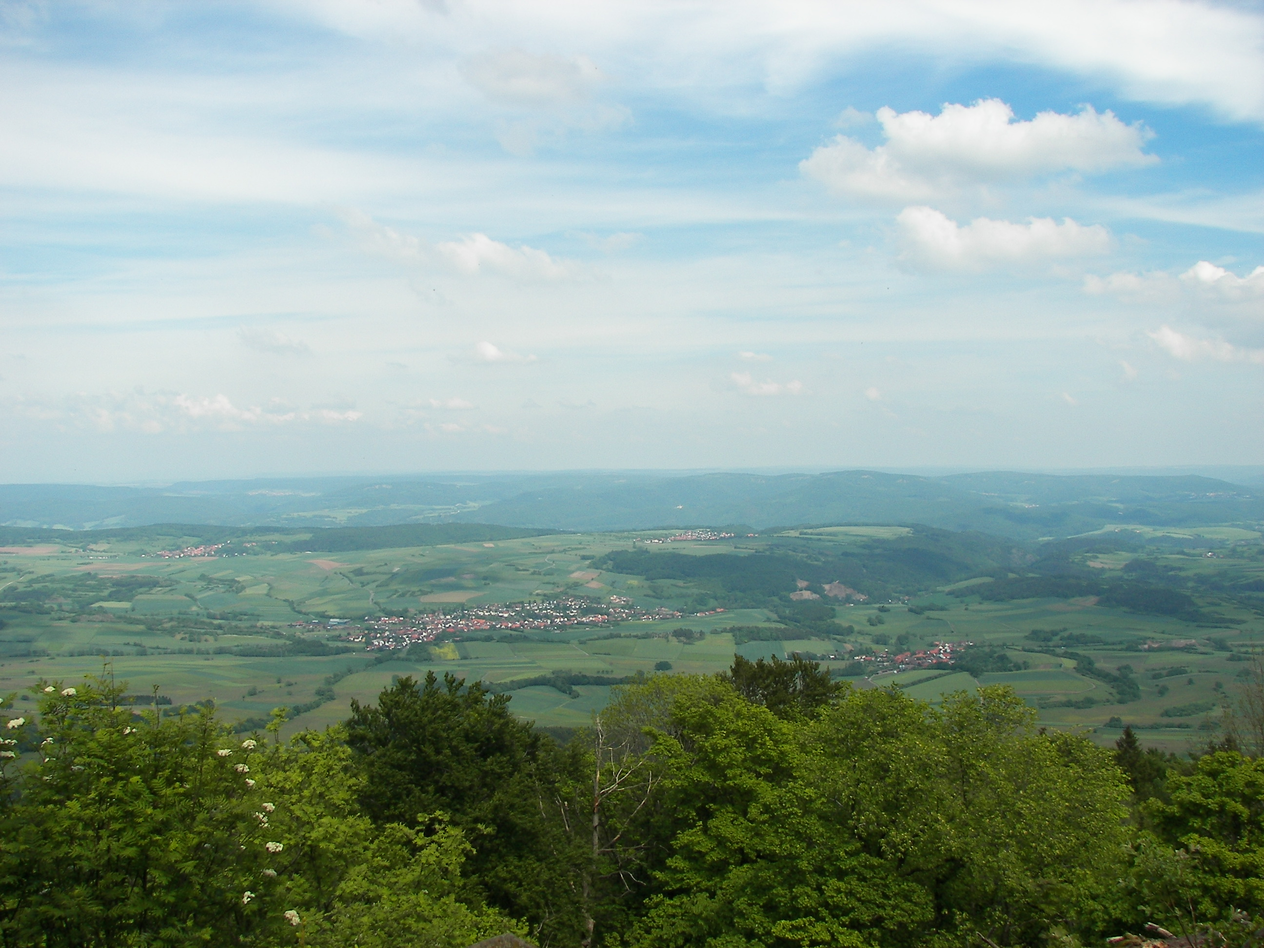 Hoher Meißner, Blick von der Kalbe (auf Frankershausen, Wolfterode, Hitzerode)